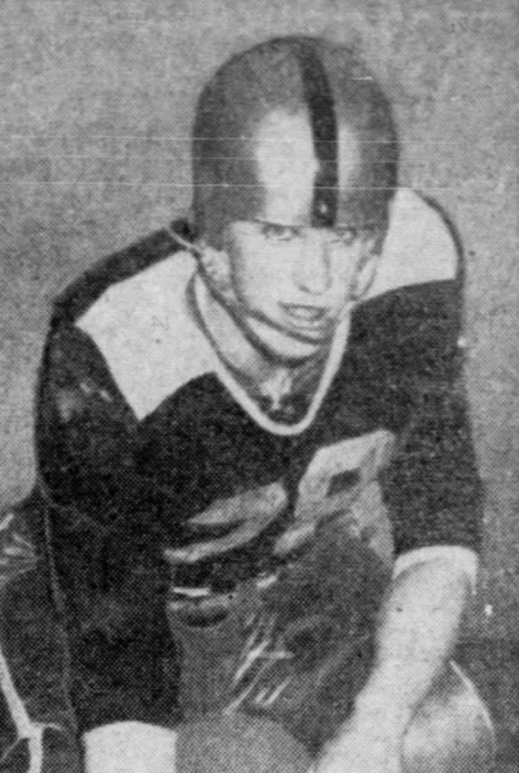 Mel Aull, ca 1947